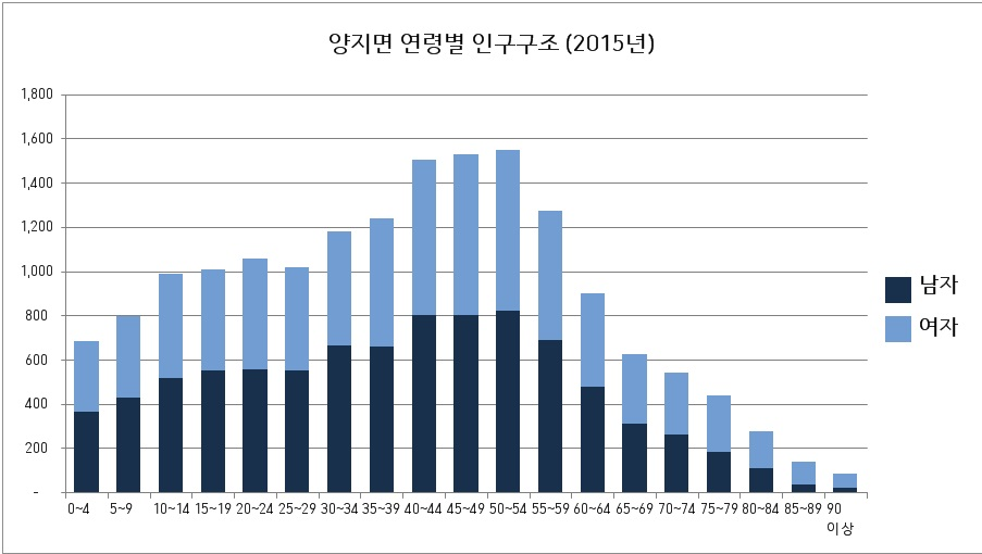 양지면 연령별 인구구조 2015